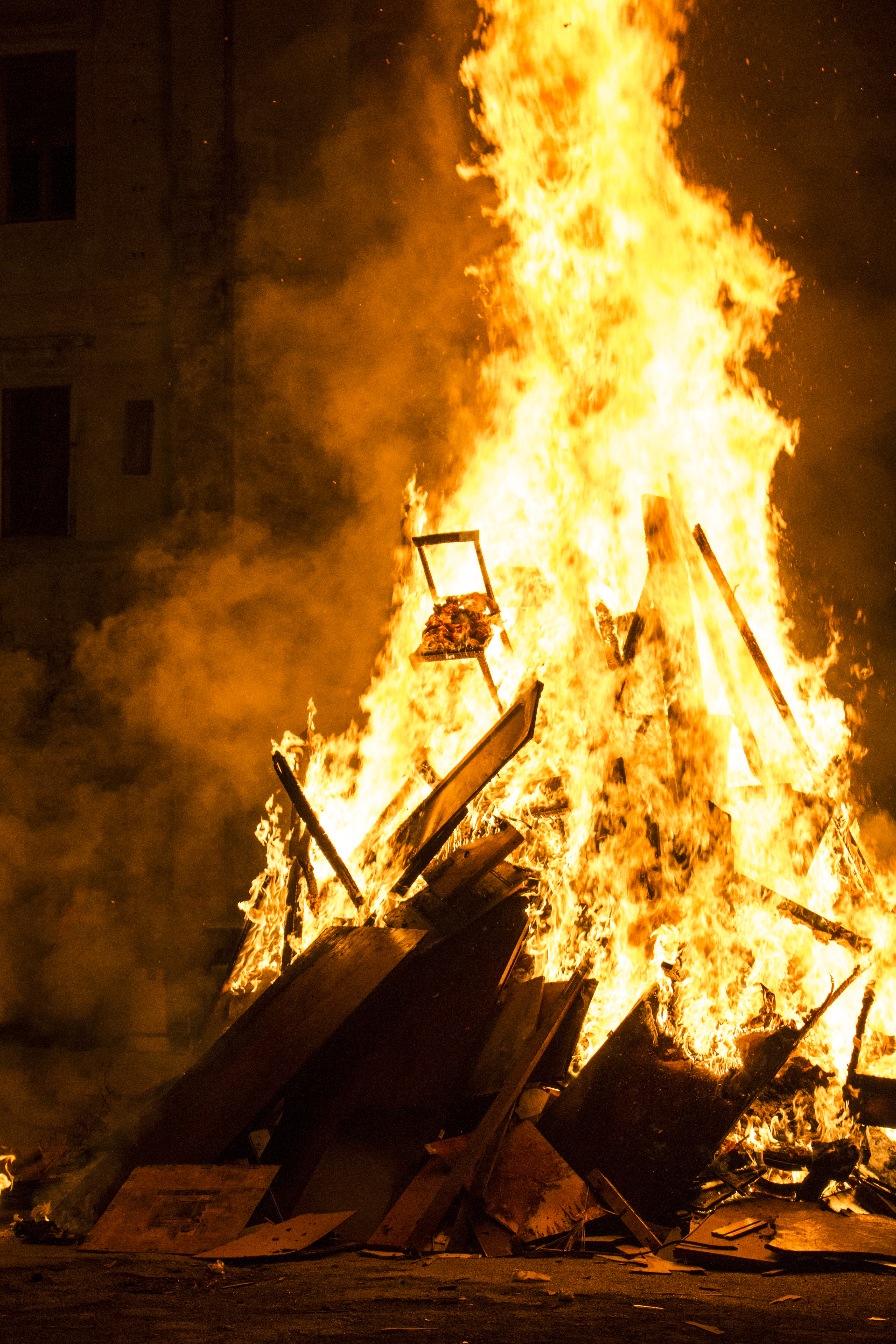 Sera del 18 Marzo in piazza Kalsa a Palermo